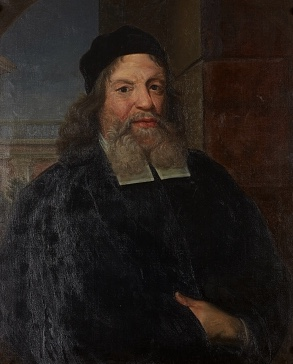 Porträtt av prästen Johannes Vultejus, kopia efter original från 1600-talet som finns i Riddarholmskyrkan.